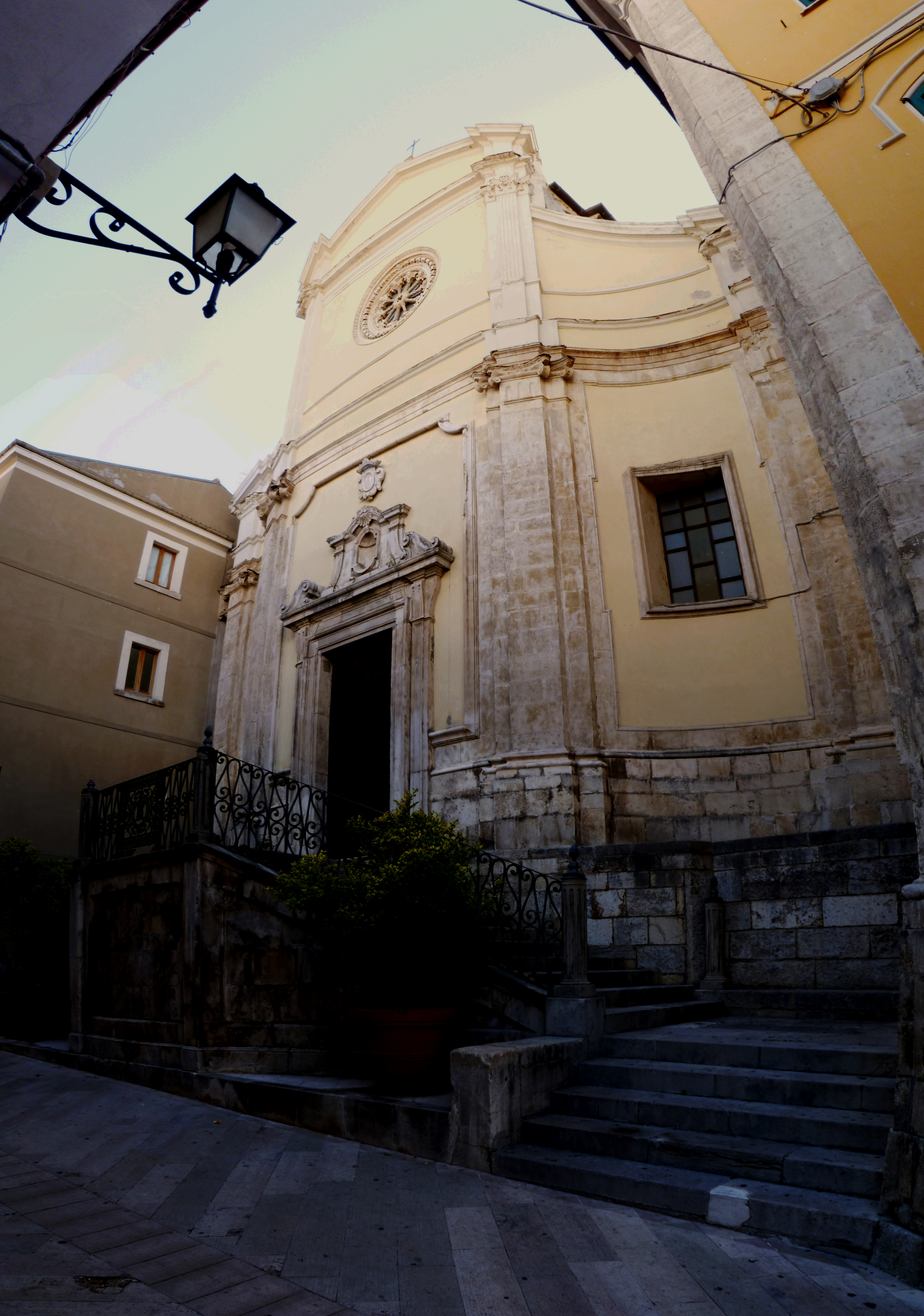 Chiesa della Madonna del Rosario, Palena, Chieti.